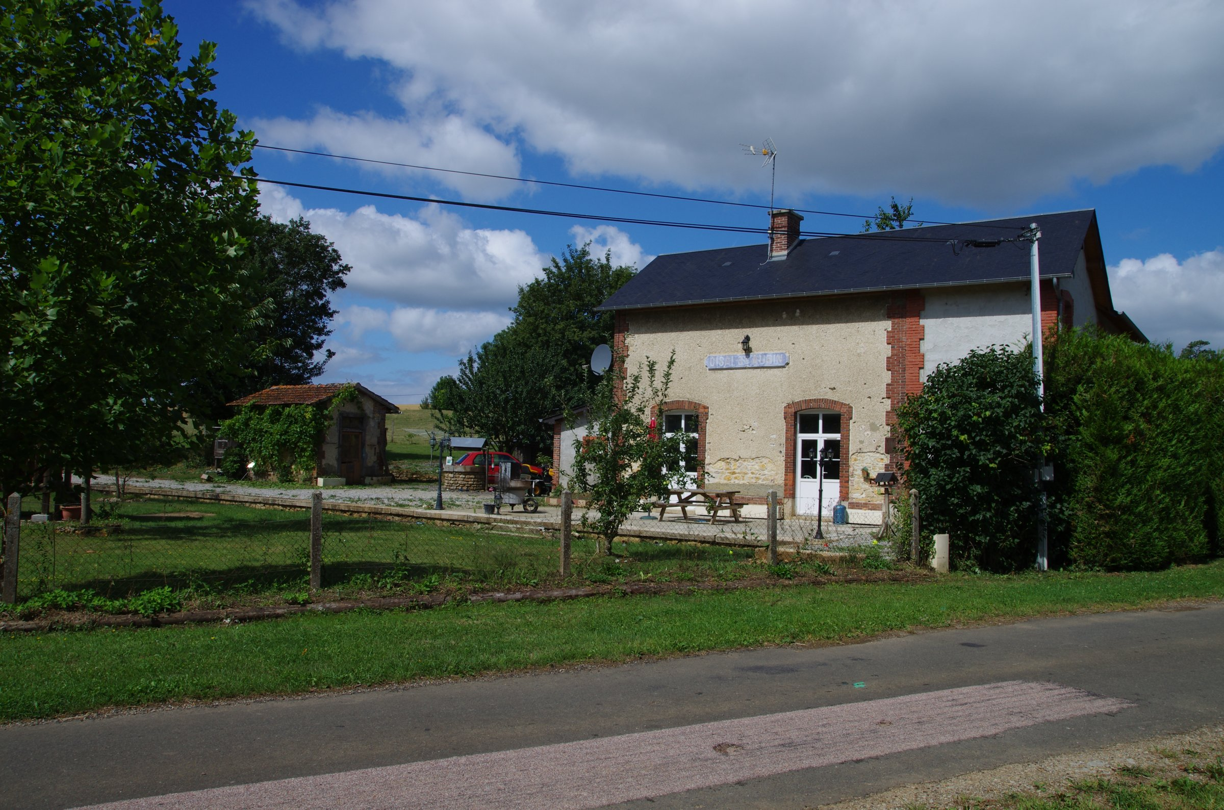 gare cisai 2015